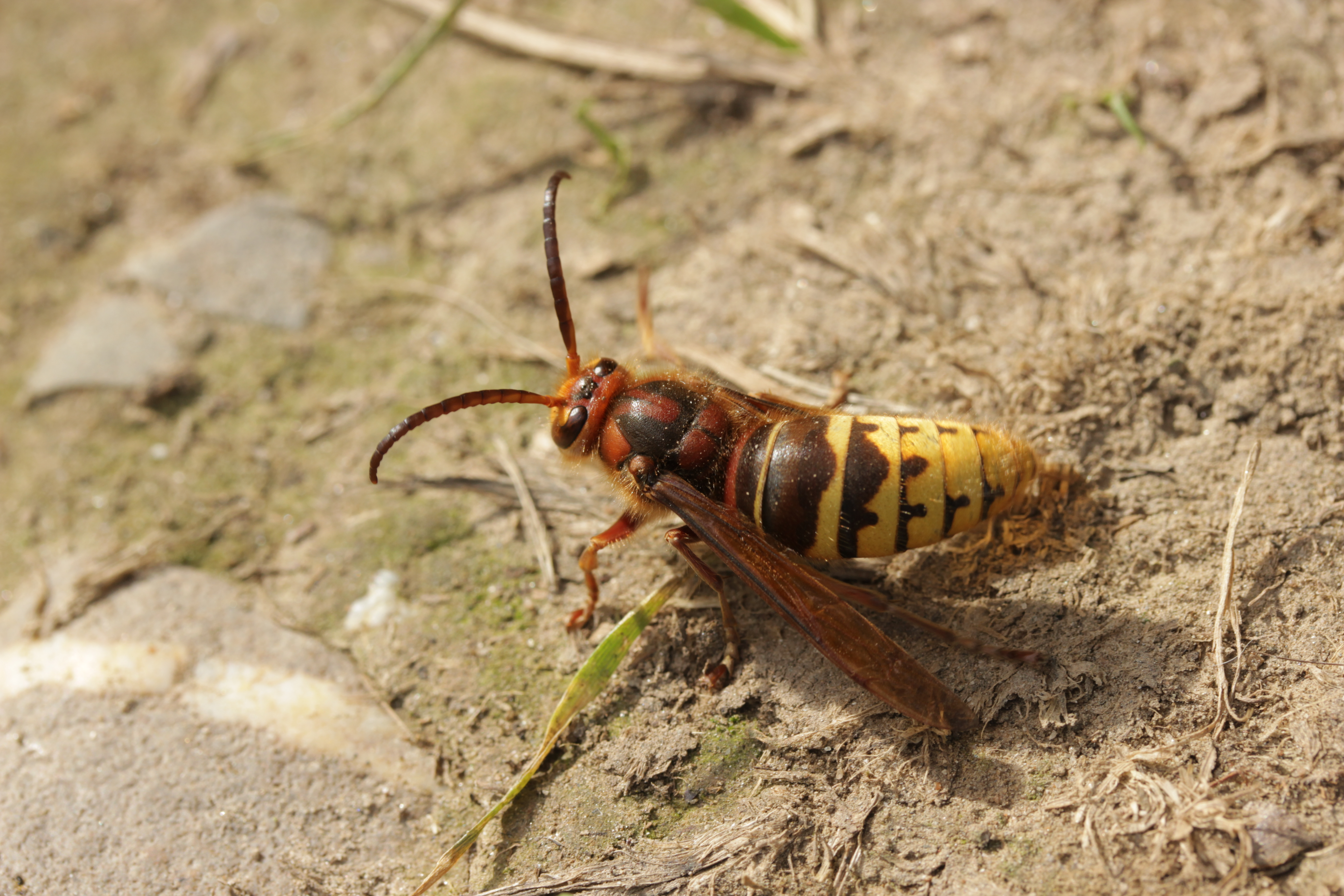 European Hornet - Vespa crabro